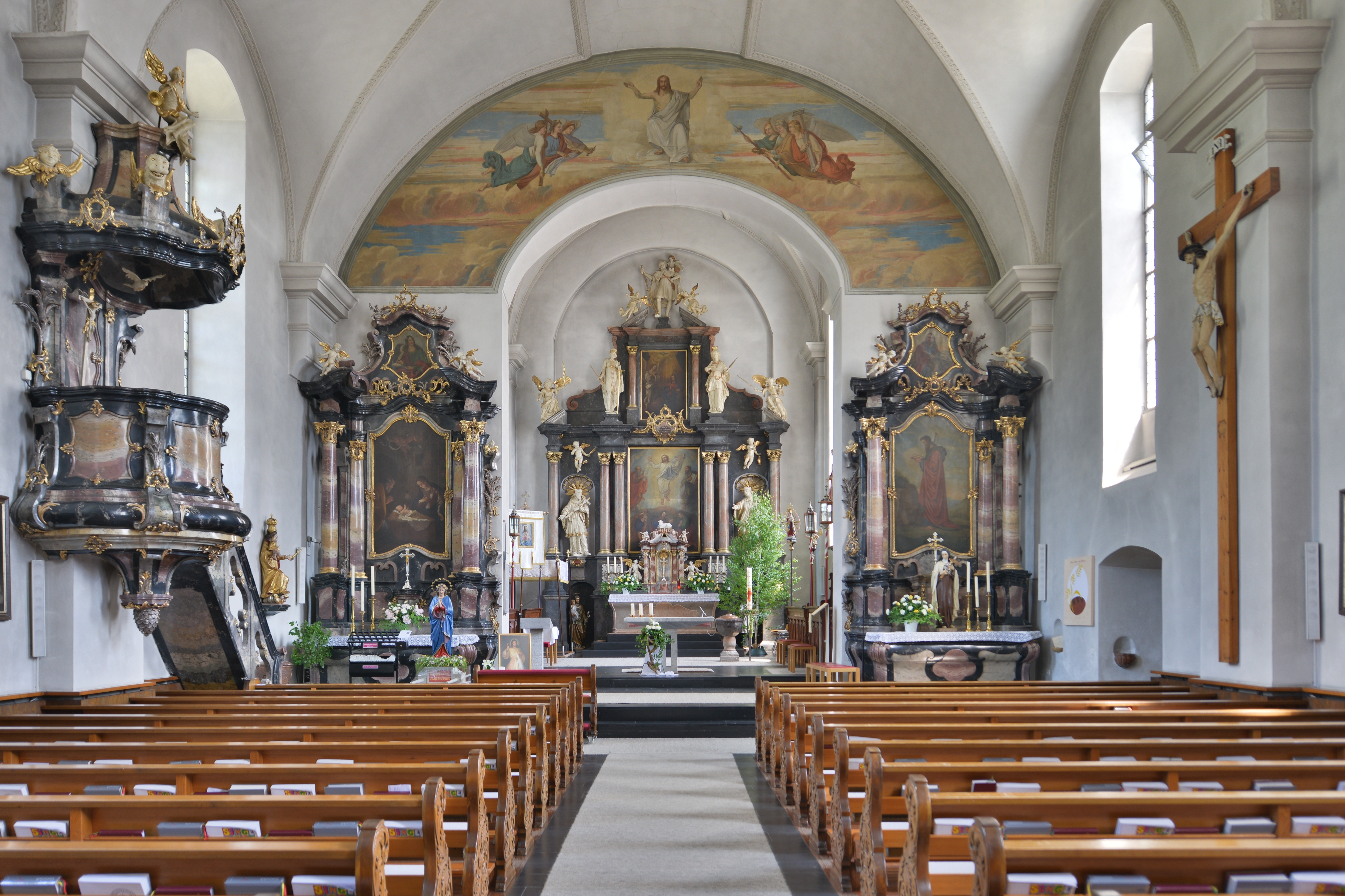 Kath. Pfarrkirche hl. Jakobus d. Ä. und Friedhof an der Alten Landstraße in Bludesch.